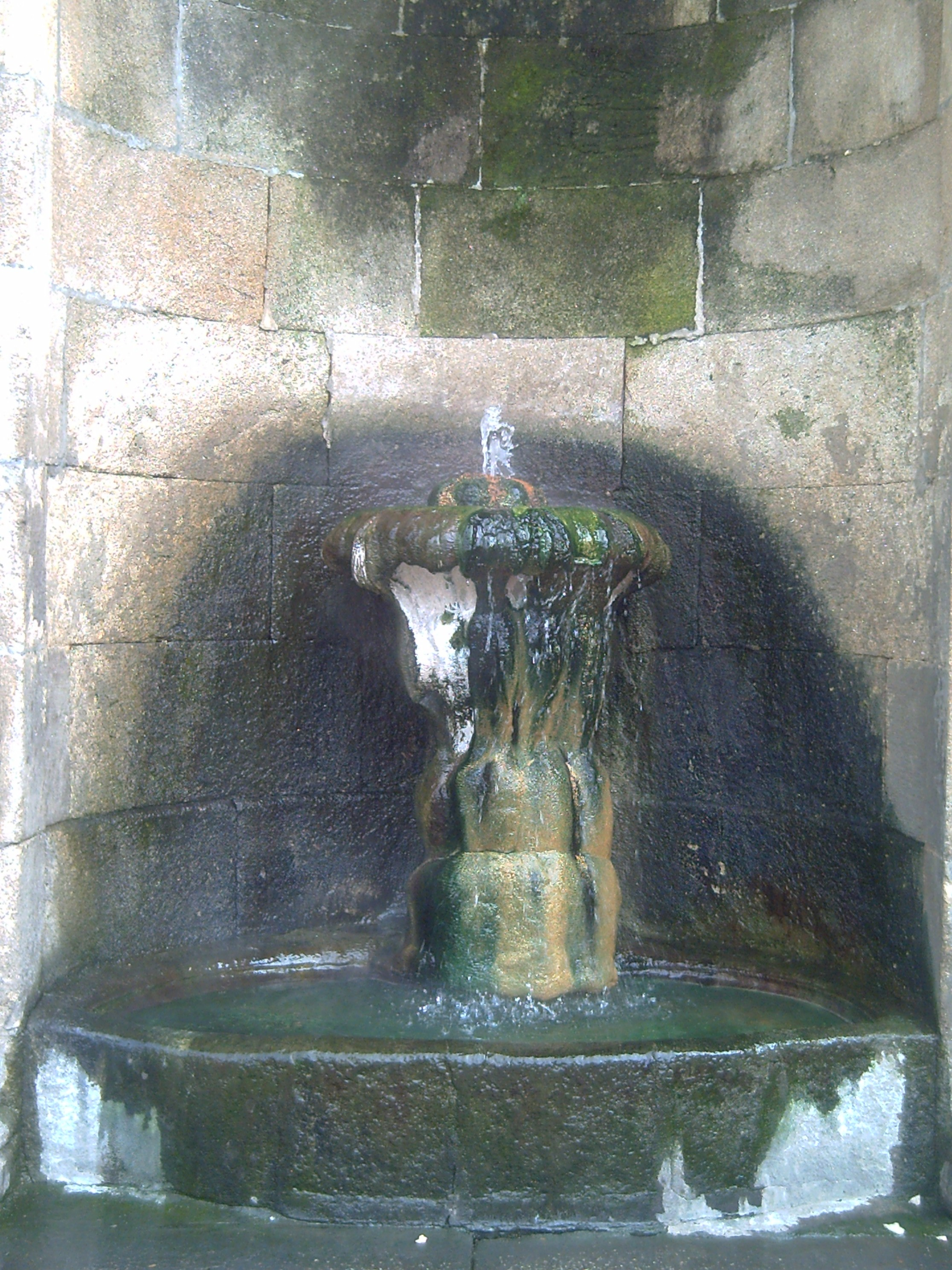 Fonte principal da Burga de Abaixo, (Ourense)